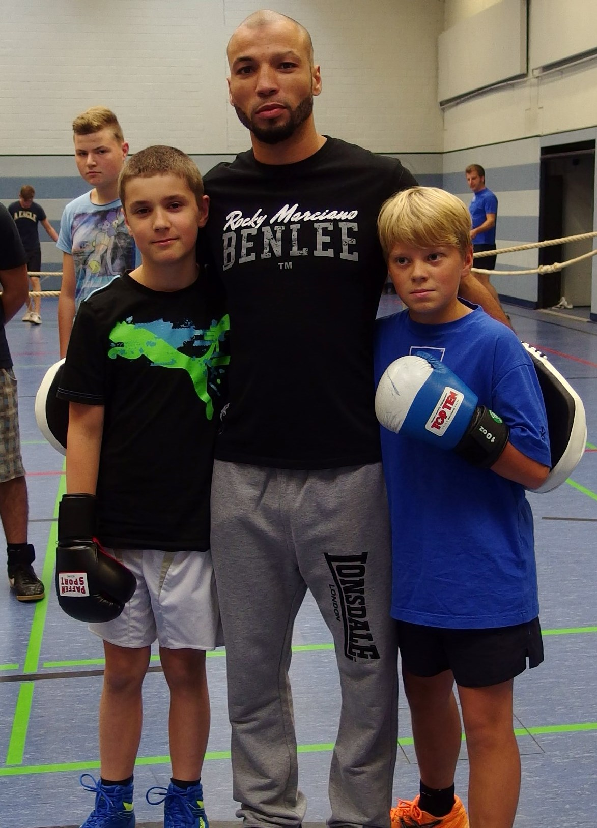 Maurice Weber fungiert sehr oft als Ansprechpartner mit Vorbildfunktion in Jugendheimen, Sportvereinen, Schulen und in Kindergärten. Er gibt Tipps und Ratschläge und wirkt positiv auf Kinder und Jugendliche. Hier in der Ganztagshauptschule Ahornweg in Bergisch Gladbach. Fotorechte unter